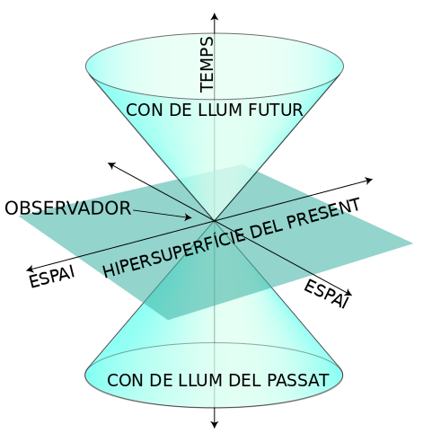 Visualització del present (pla blau més fosc) i els cons de llum passat i futur en 2D